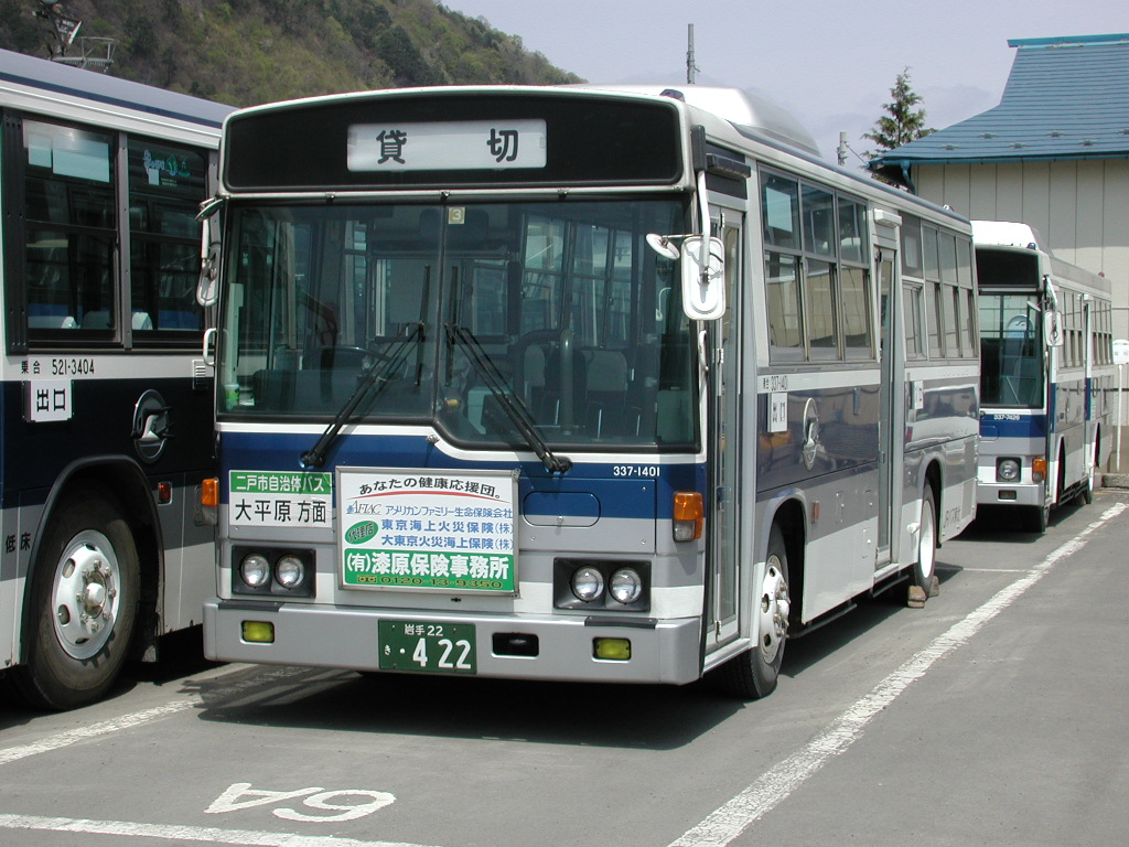 撮影当時の車両（貸切）